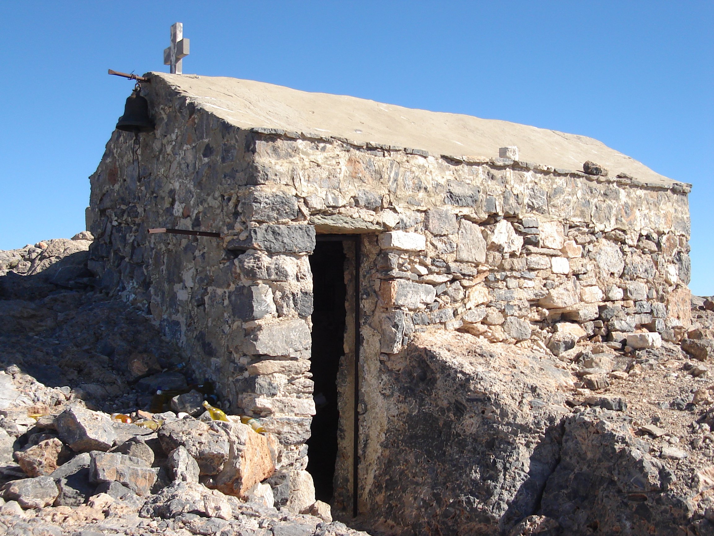 Η εκκλησία του Αφέντη Χριστού στα Αμιρα